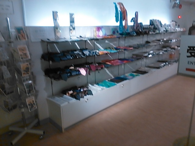 横浜市中区、シルク博物館のミュージアムショップ